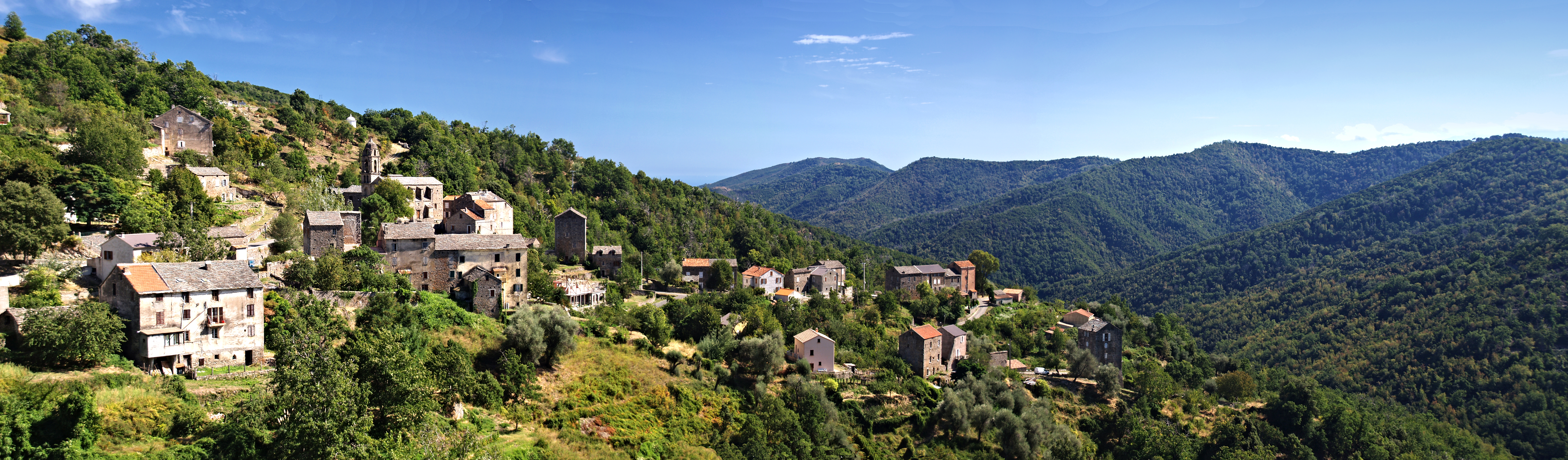 Zuani (Corsica) - Vue du village